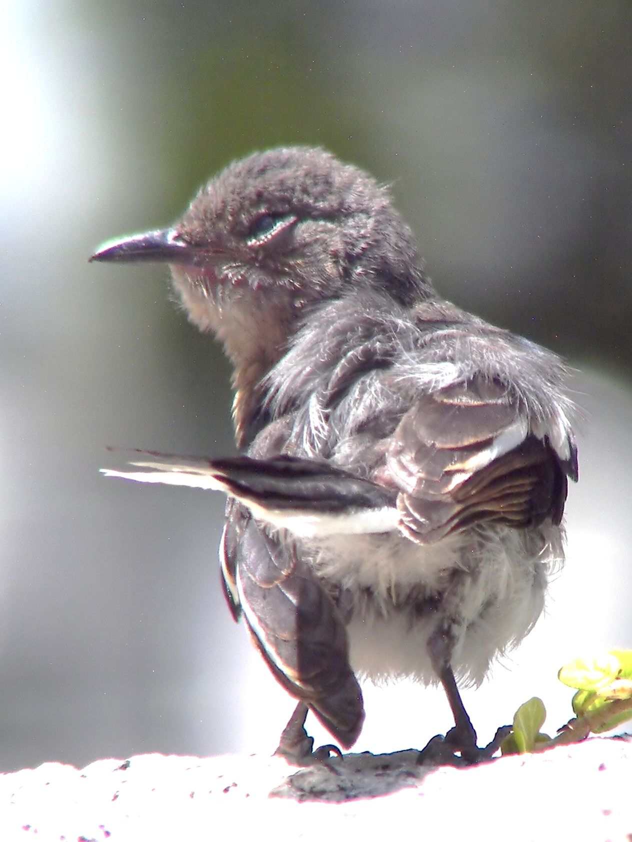 Juvenile Magpie Robin (Copsychus saularis) seen at park area.